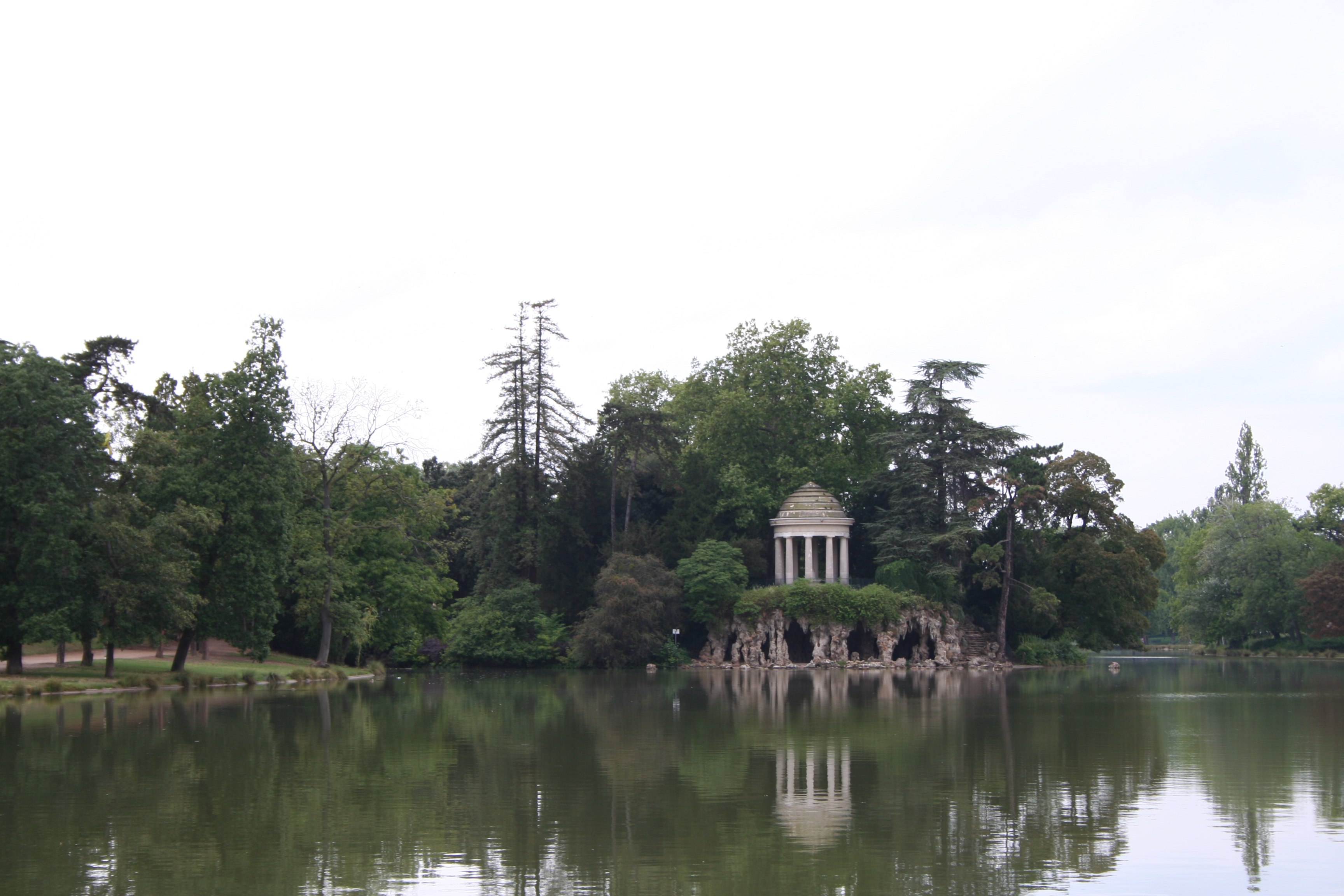 Bois de Vincennes, Paris, France.